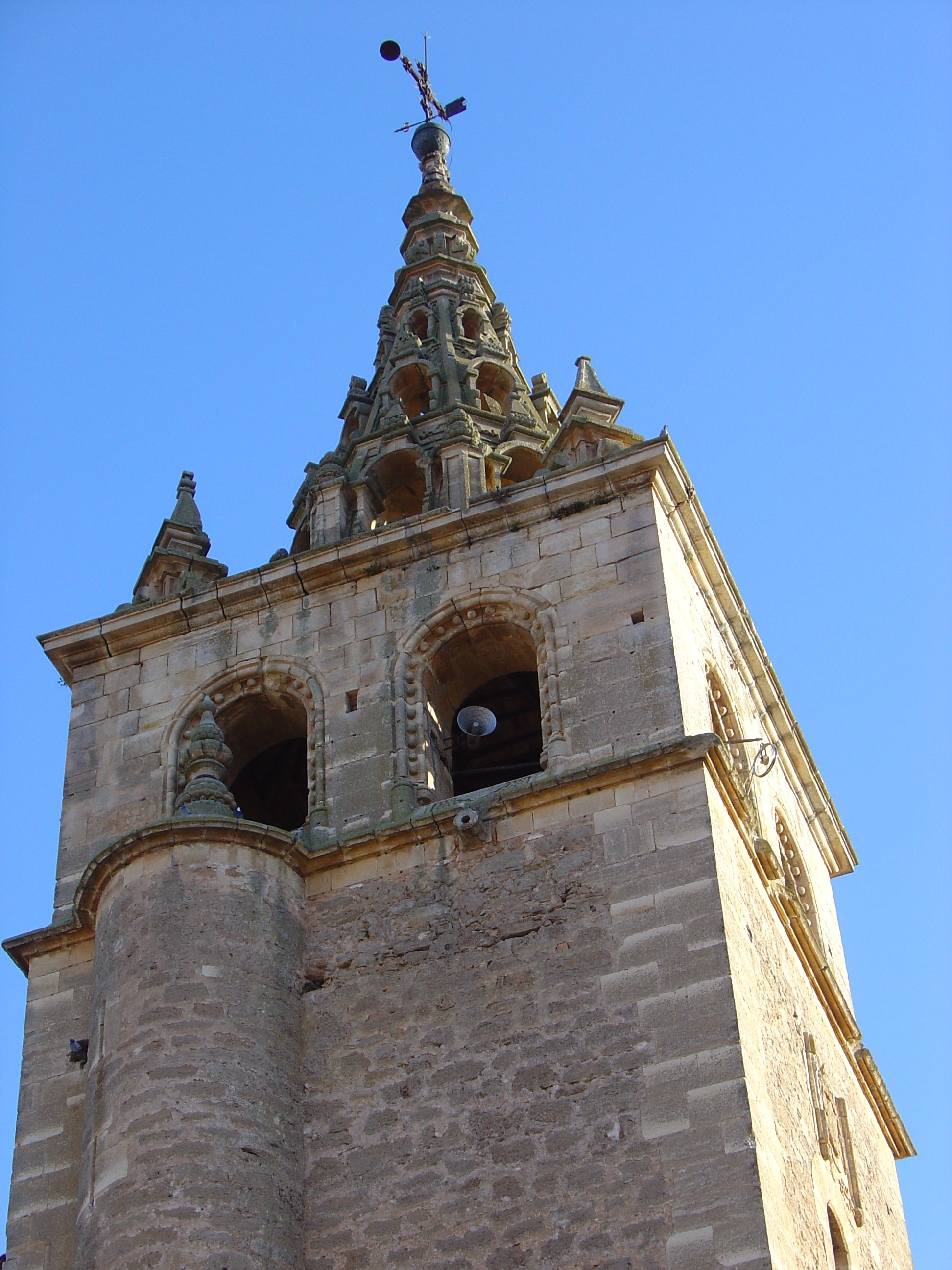 Cúpula de la basílica de Villanueva de la jara, Cuenca, España